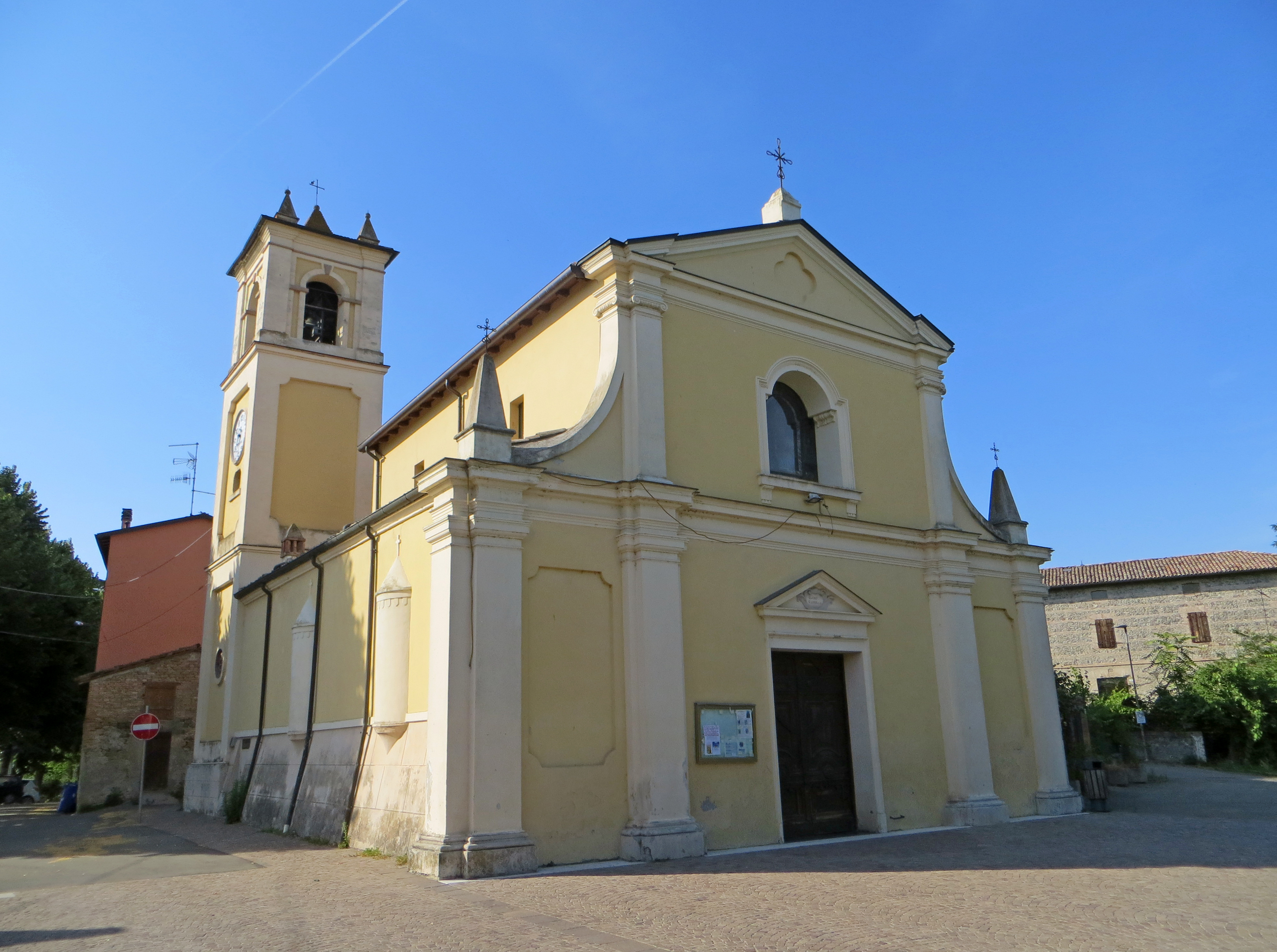 Chiesa di San Lorenzo (Tortiano, Montechiarugolo) - facciata e lato sud